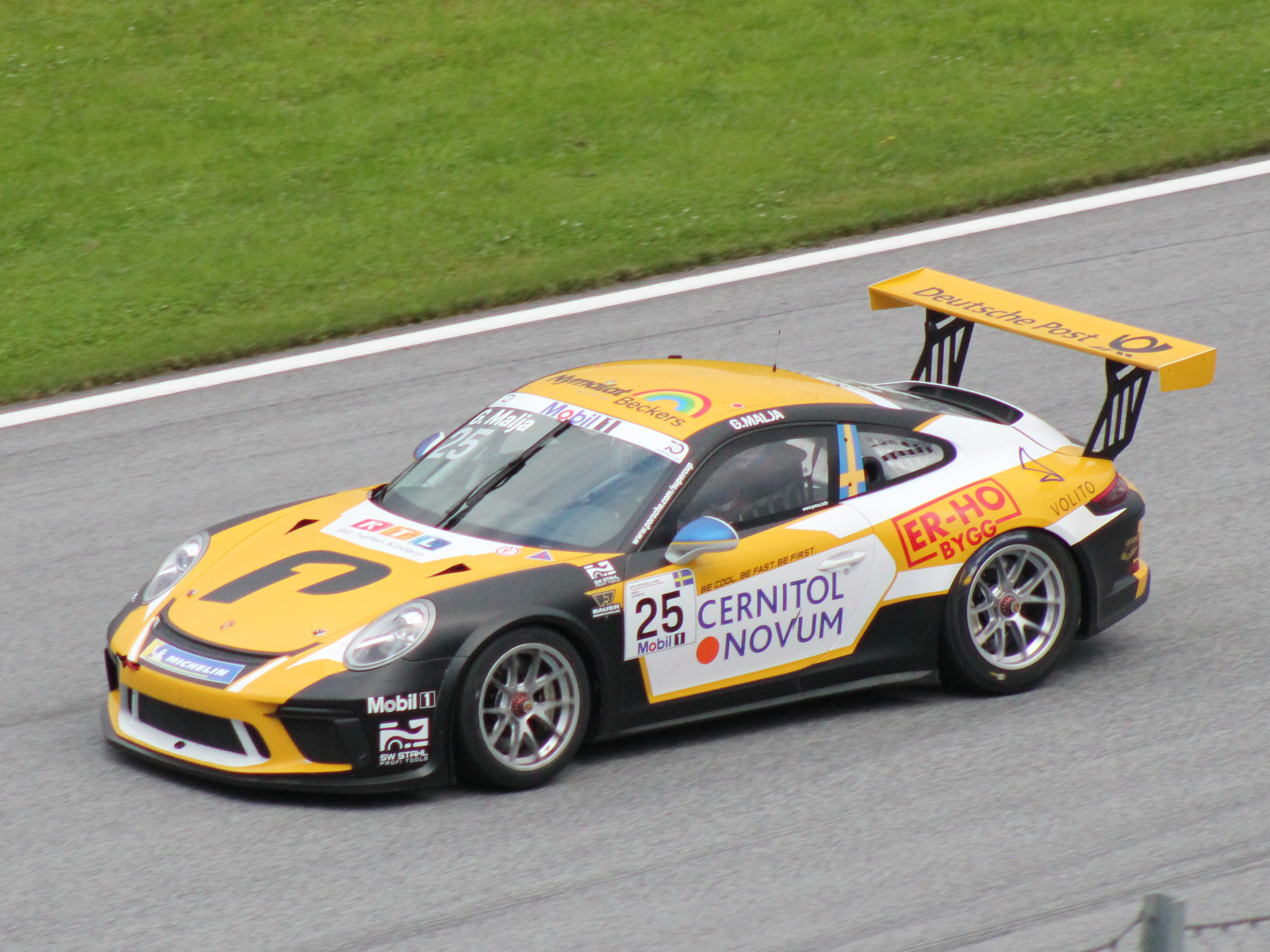 25 Gustav Malja beim Rennwochenende in Österreich 2018